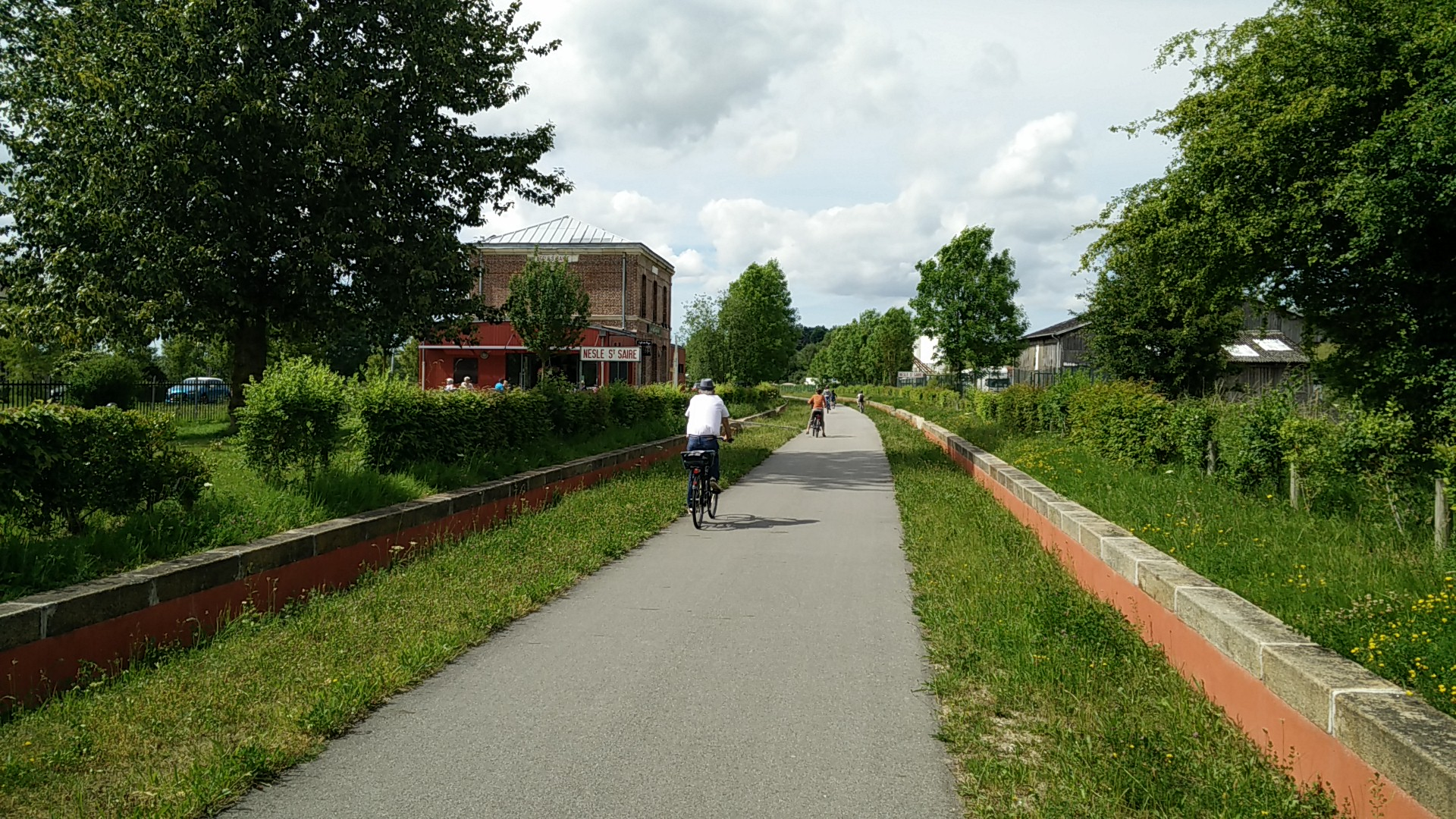 Avenue verte - Ancienne gare de Nesle - Saint Saire Commune de Nesle-Hodeng